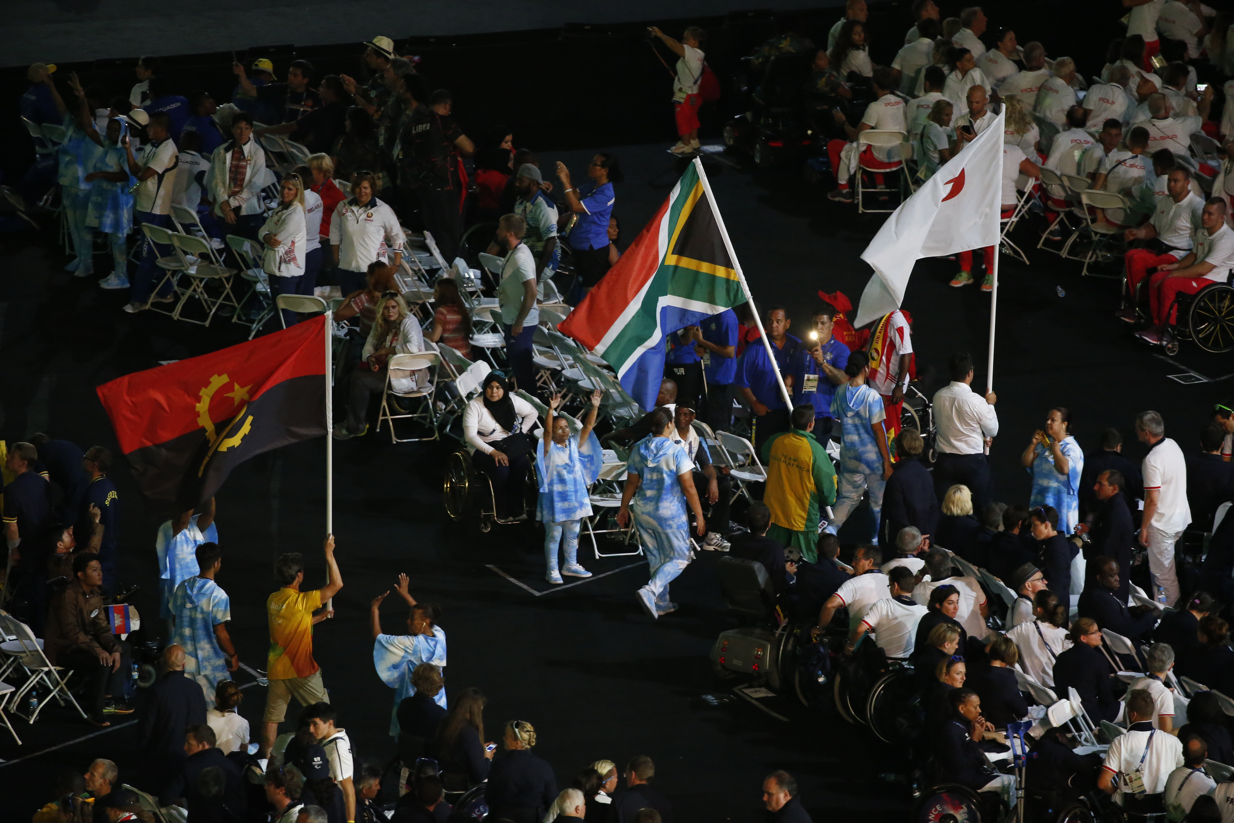 Rio de Janeiro - Cerimônia de encerramento dos Jogos Paralímpicos no Estádio do Maracanã (Fernando Frazão/Agência Brasil)